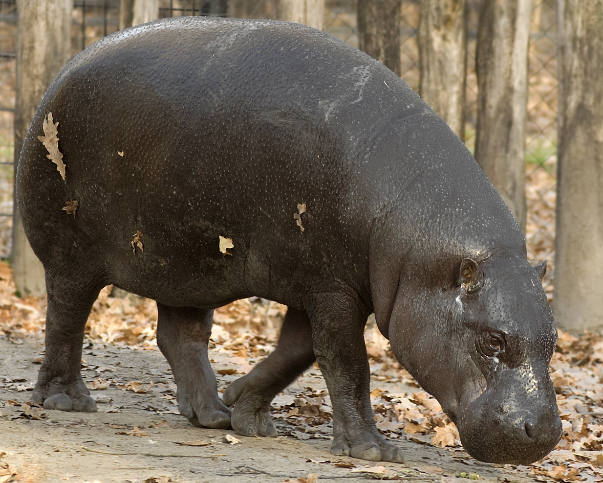 Szeged zoo